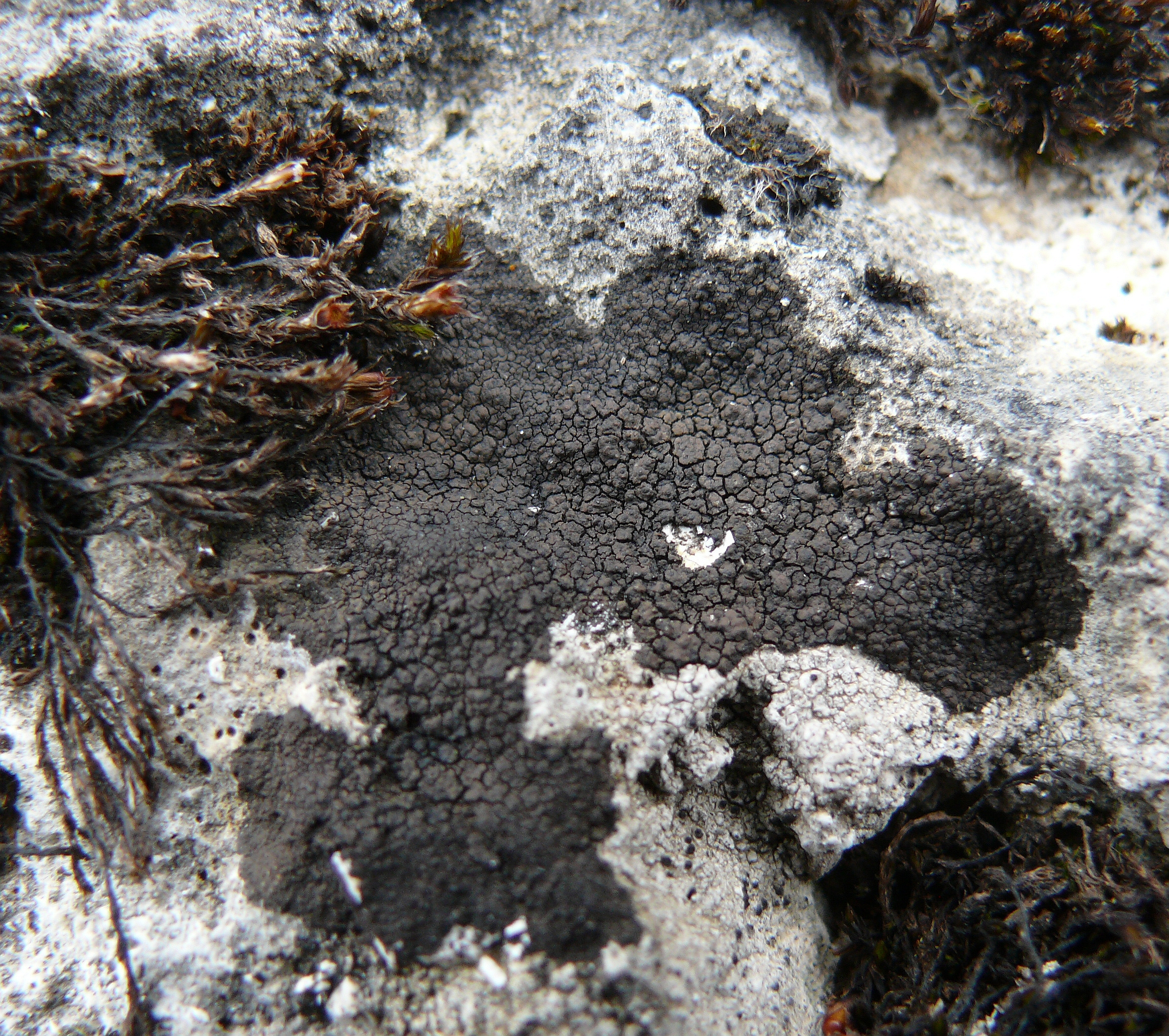 Verrucaria nigrescens, Schwäbische Alb, Deutschland